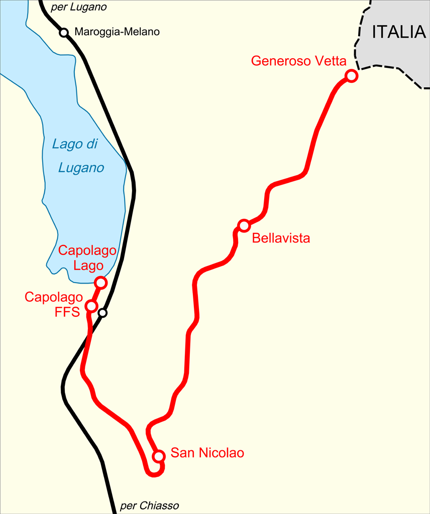 Mappa della ferrovia del Monte Generoso (MG).